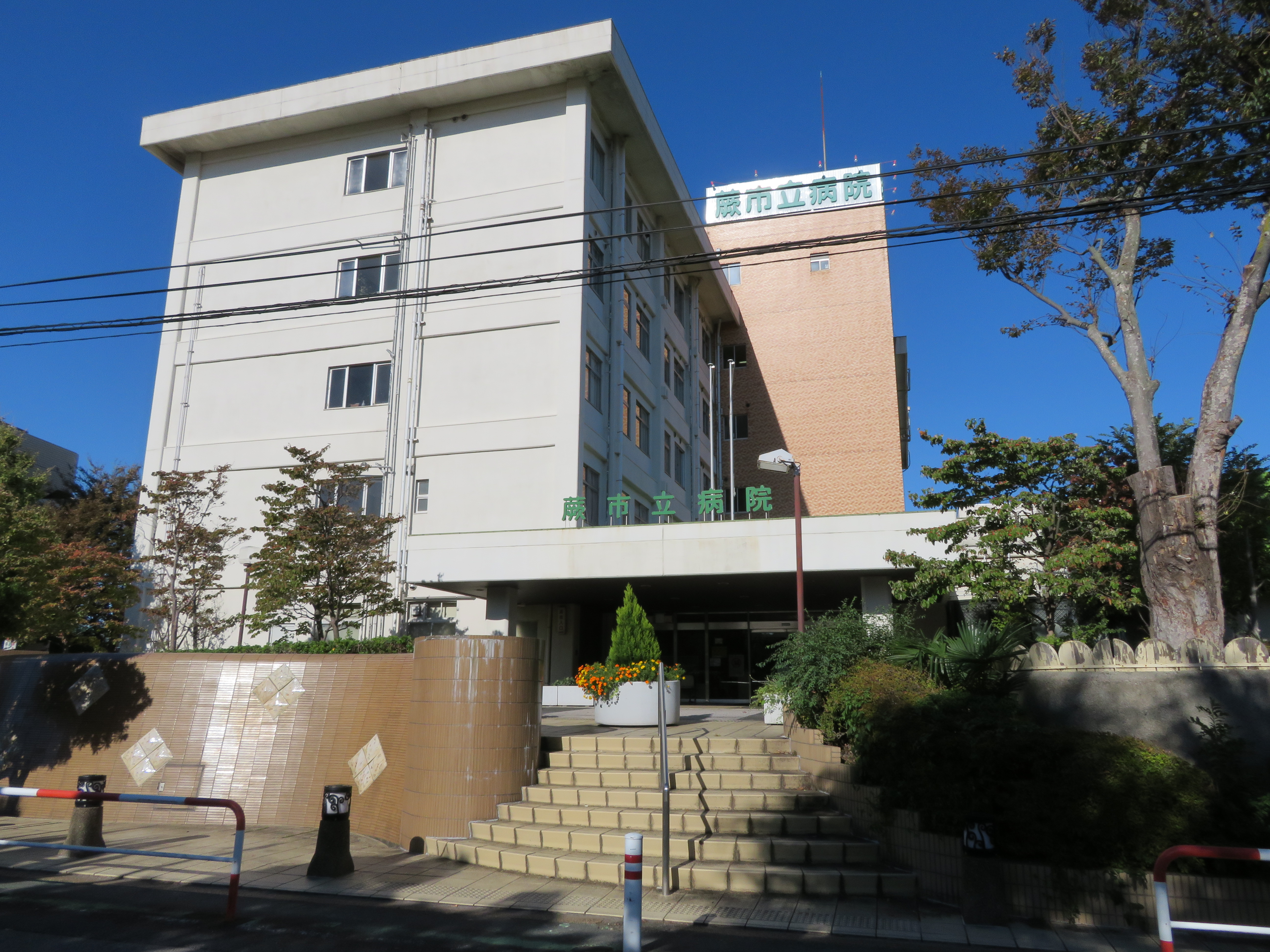 埼玉県蕨市に所在する蕨市立病院 Canon PowerShot SX720 HS